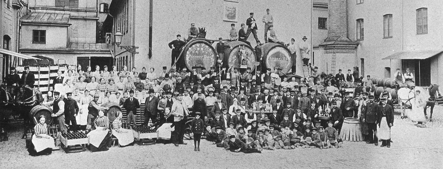 Nürnbergs Bryggeri vid Högbergsgatan på Södermalm i Stockholm, personalen